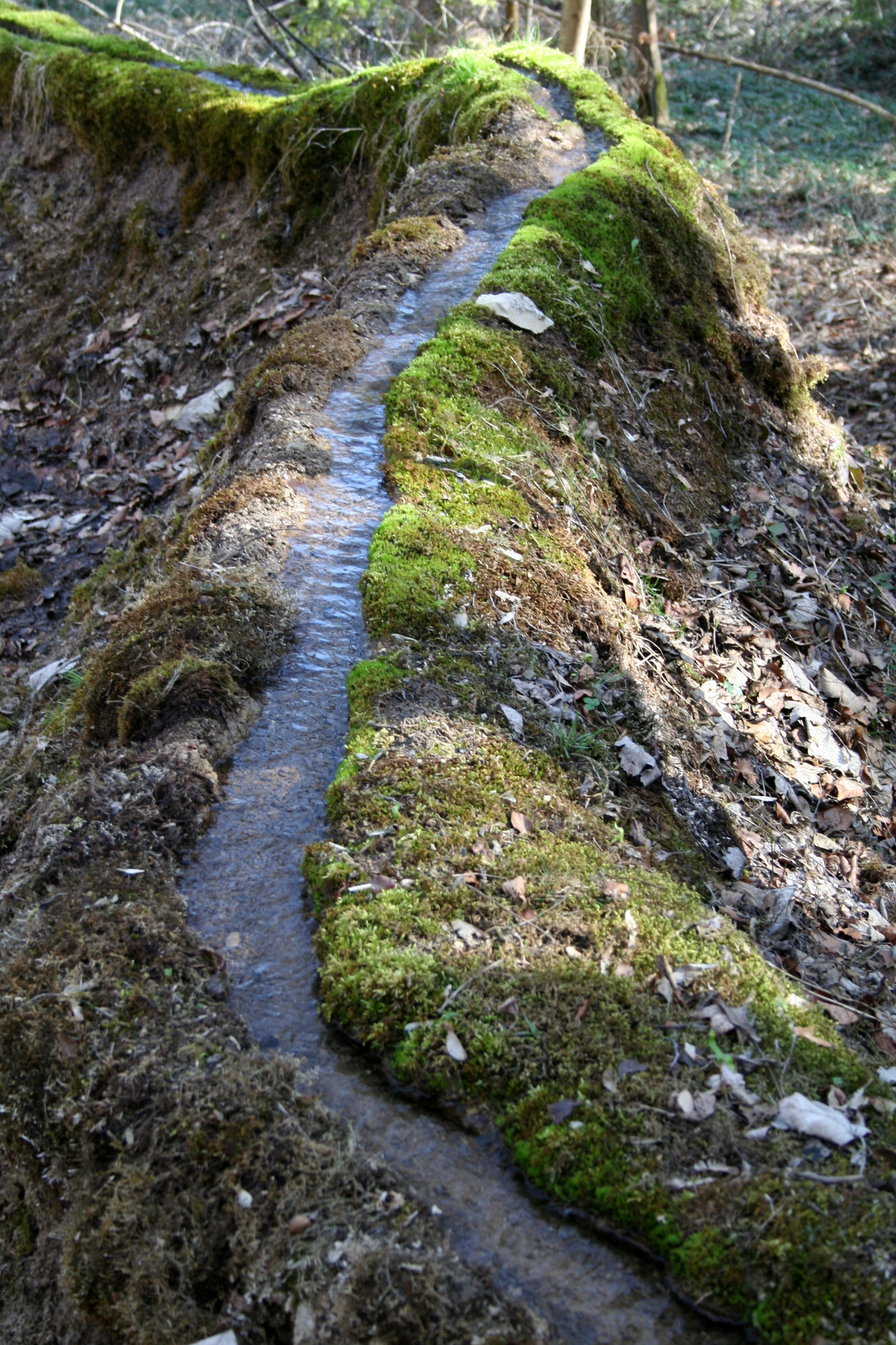 Steinerne Rinne bei Rohrbach, Tafel